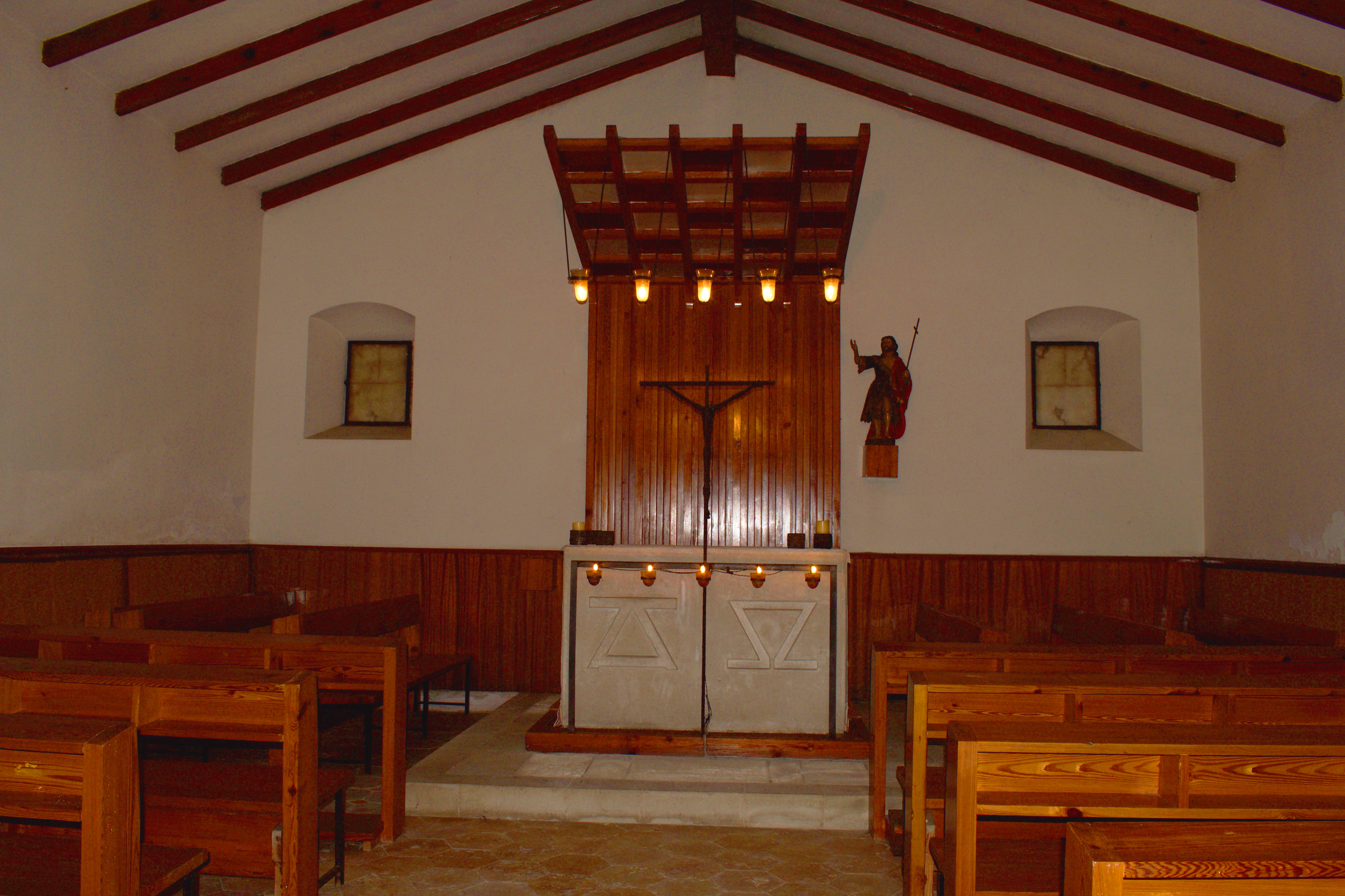 Vista general de la Capella de Sant Joan Baptista de Lliçà de Vall